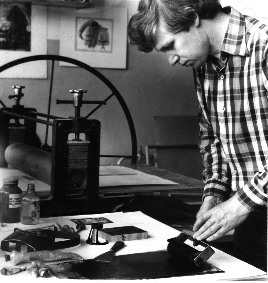 Александр Бакулевский у станка в мастерской. Автоспуск собственного фотоаппарата. 1972 г.